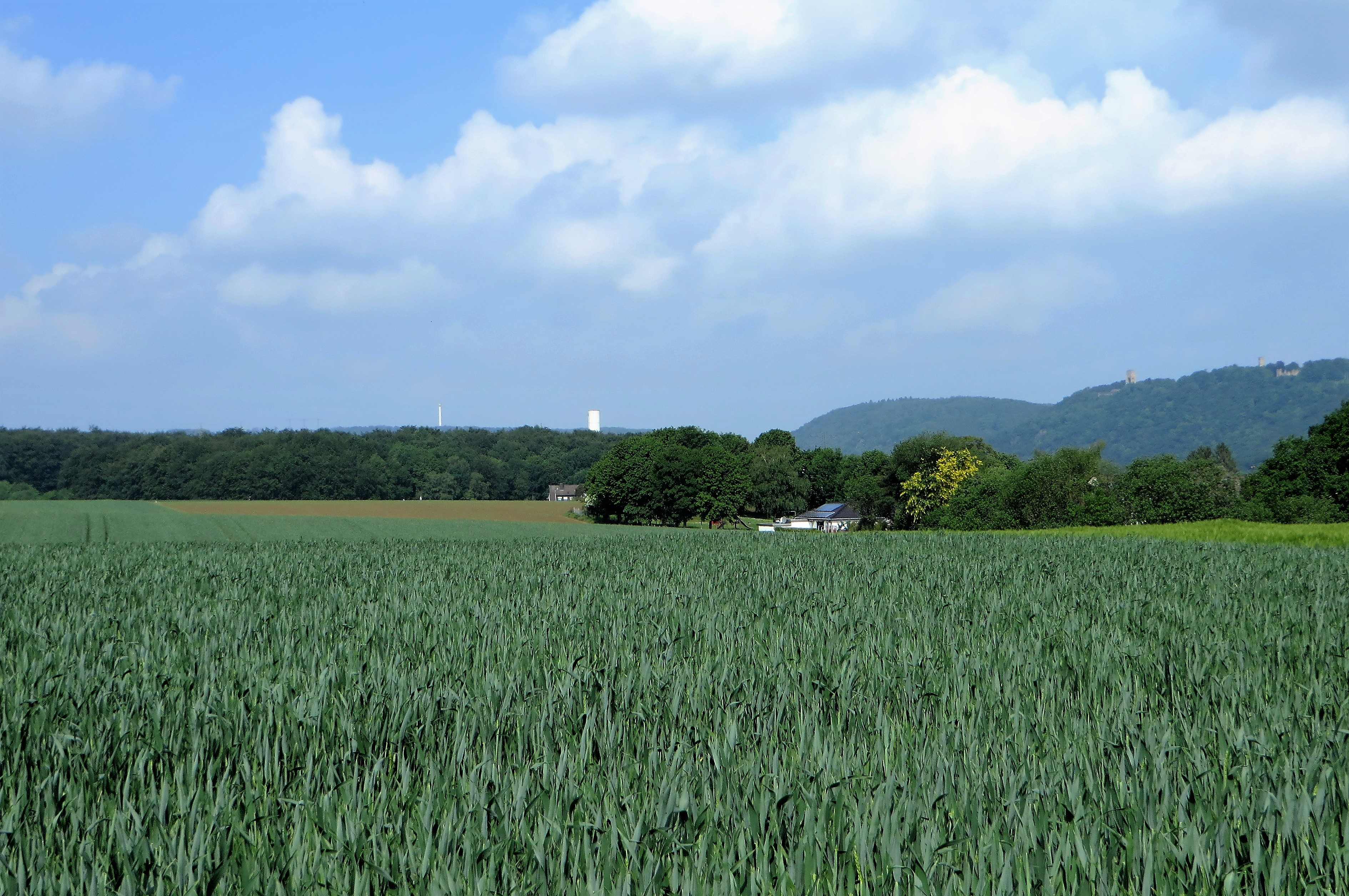 Landschaftsschutzgebiet „Garenfelder Wald“ in Hagen-Garenfeld. Blick von der Westhofener Straße auf den Wald links hinter dem Feld, rechts am Horizont ist die Hohensyburg zu sehen.